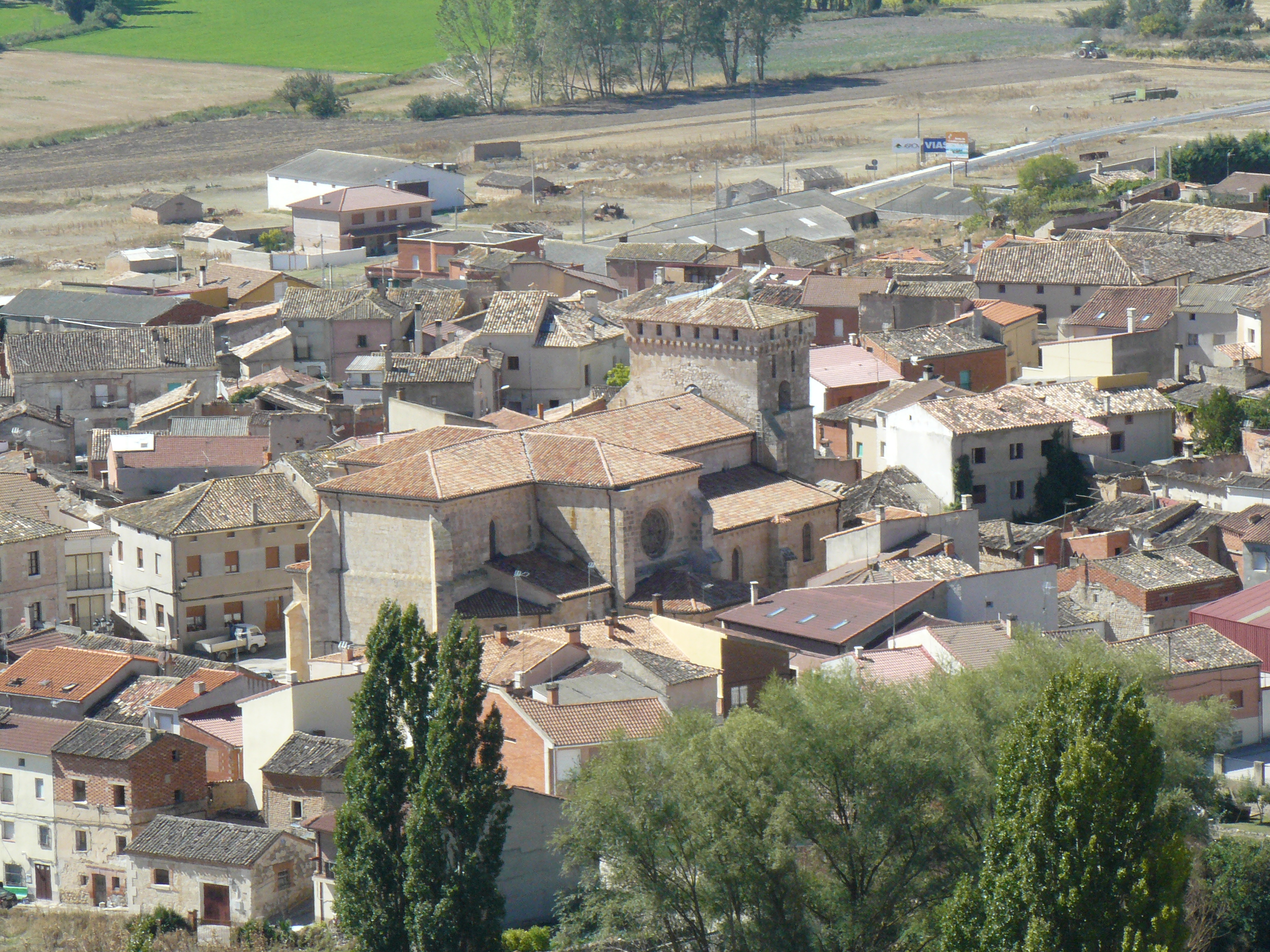 Tórtoles de Esgueva, Burgos.